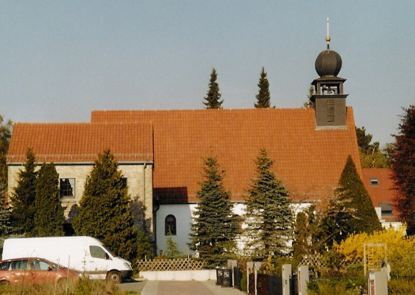 Die katholische Pfarrkirche St. Konrad von Parzham in Berlin Falkenberg, Ahrensfelder Chaussee 79/81, von der Elisabeth-Schiemann-Straße aus gesehen.